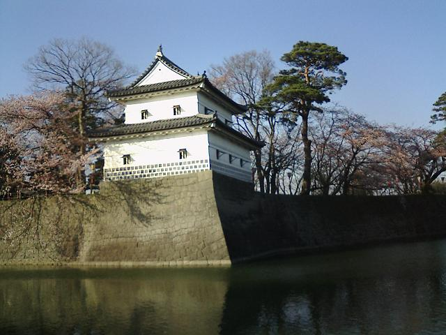 Ni-no-maru Sumi-yagura turret (Japan's national important cultural property), Shibata Castle, Niigata pref., Japan